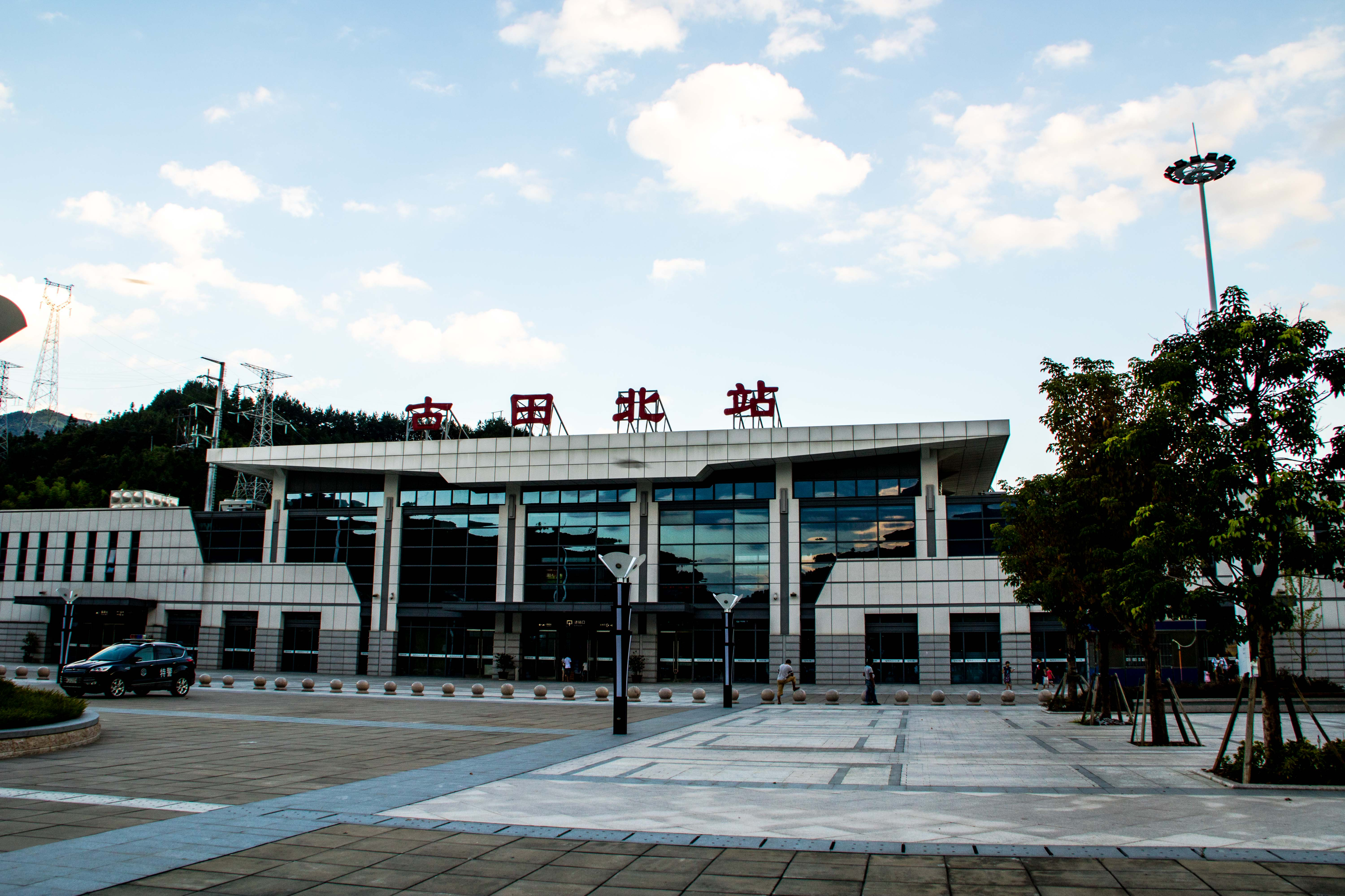 中文（中国大陆）: 古田北站站房